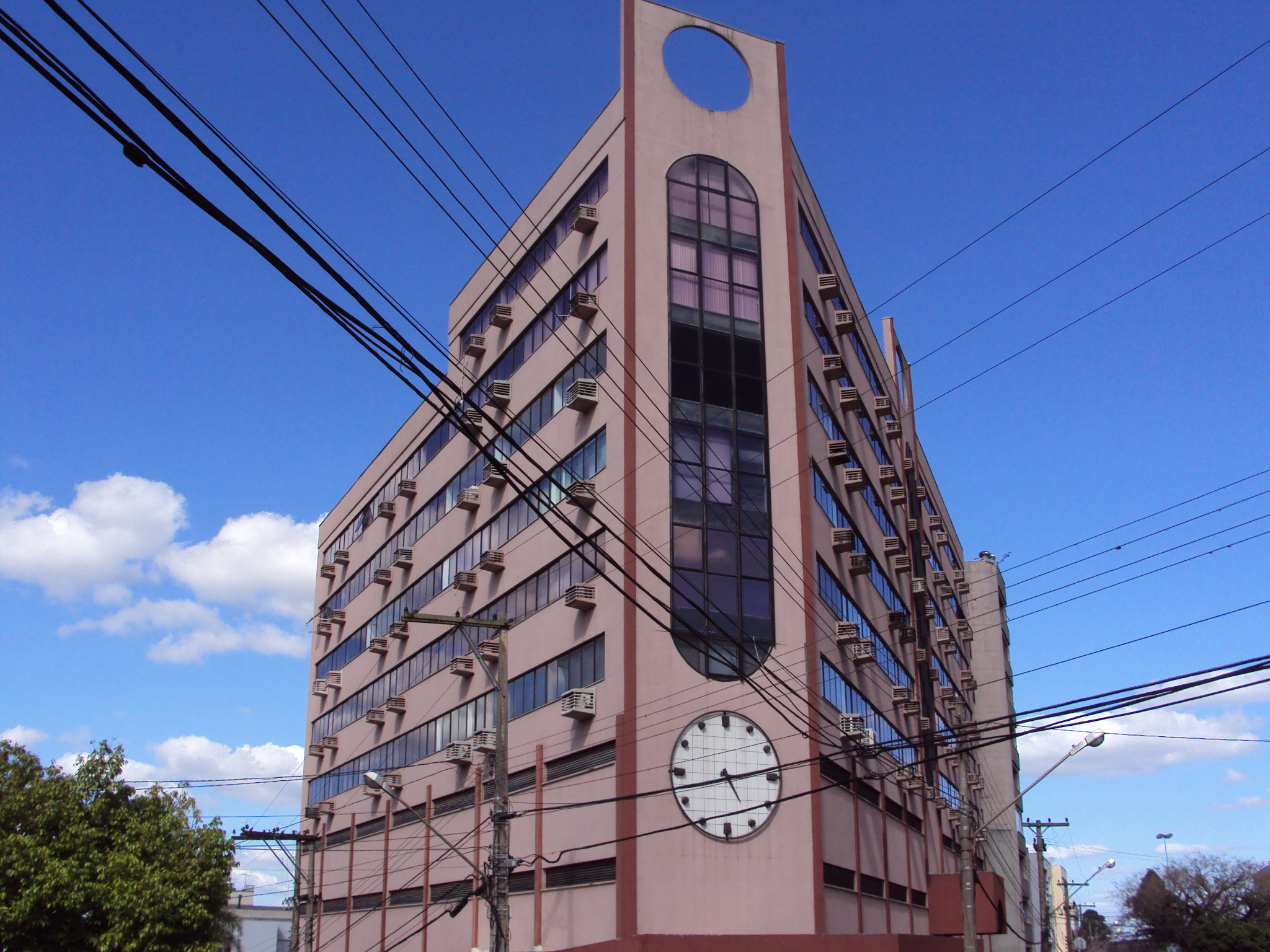 Prédio do Relógio em Erechim, no Brasil.